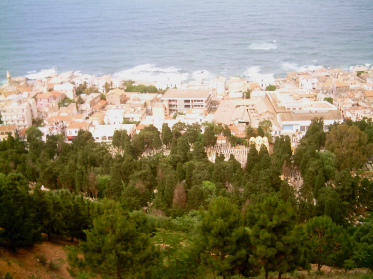 Commune de Bologhine (ancien quartier Saint Eugène) à Alger, vue de Notre dame d'Afrique.